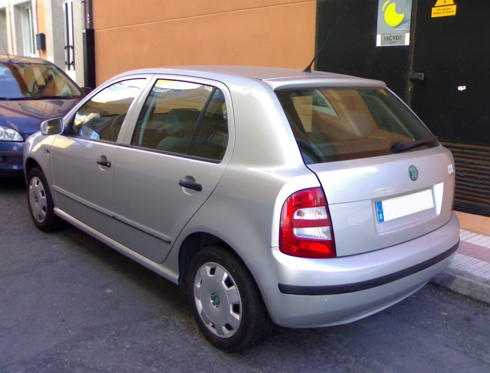 Parte trasera de un Škoda Fabia Comfort.